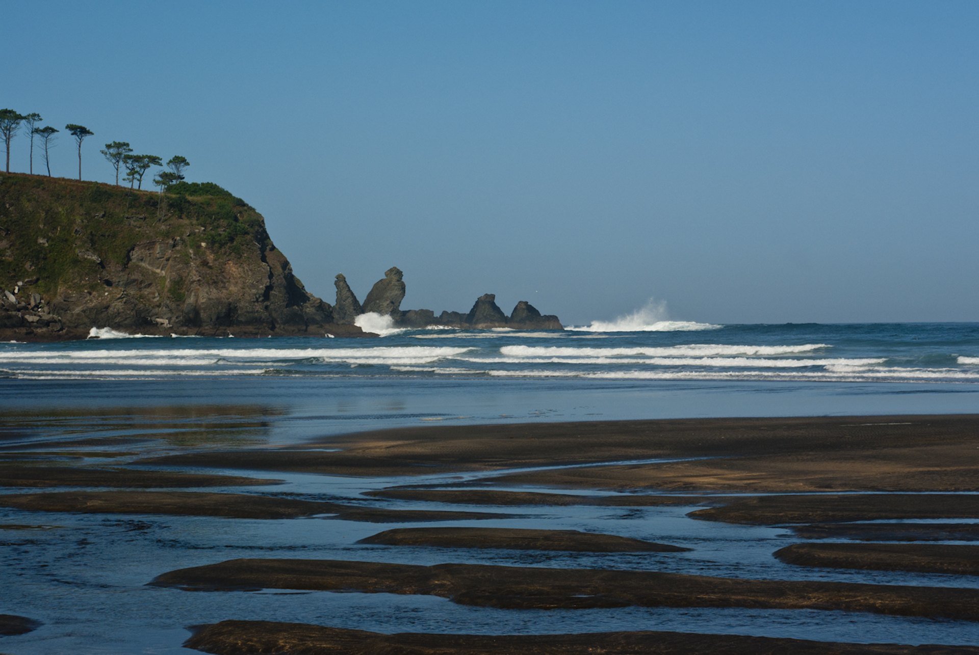 La playa de Barayo está situada en el occidente de Asturias, entre los concejos de Navia y de Valdés. En ella desemboca el río Barayo. Reserva natural formada por arena, dunas y marismas. This is a photography of a Special Area of Conservation in Spain with the ID: ES0000317. Natura2000 entry, EEA entry